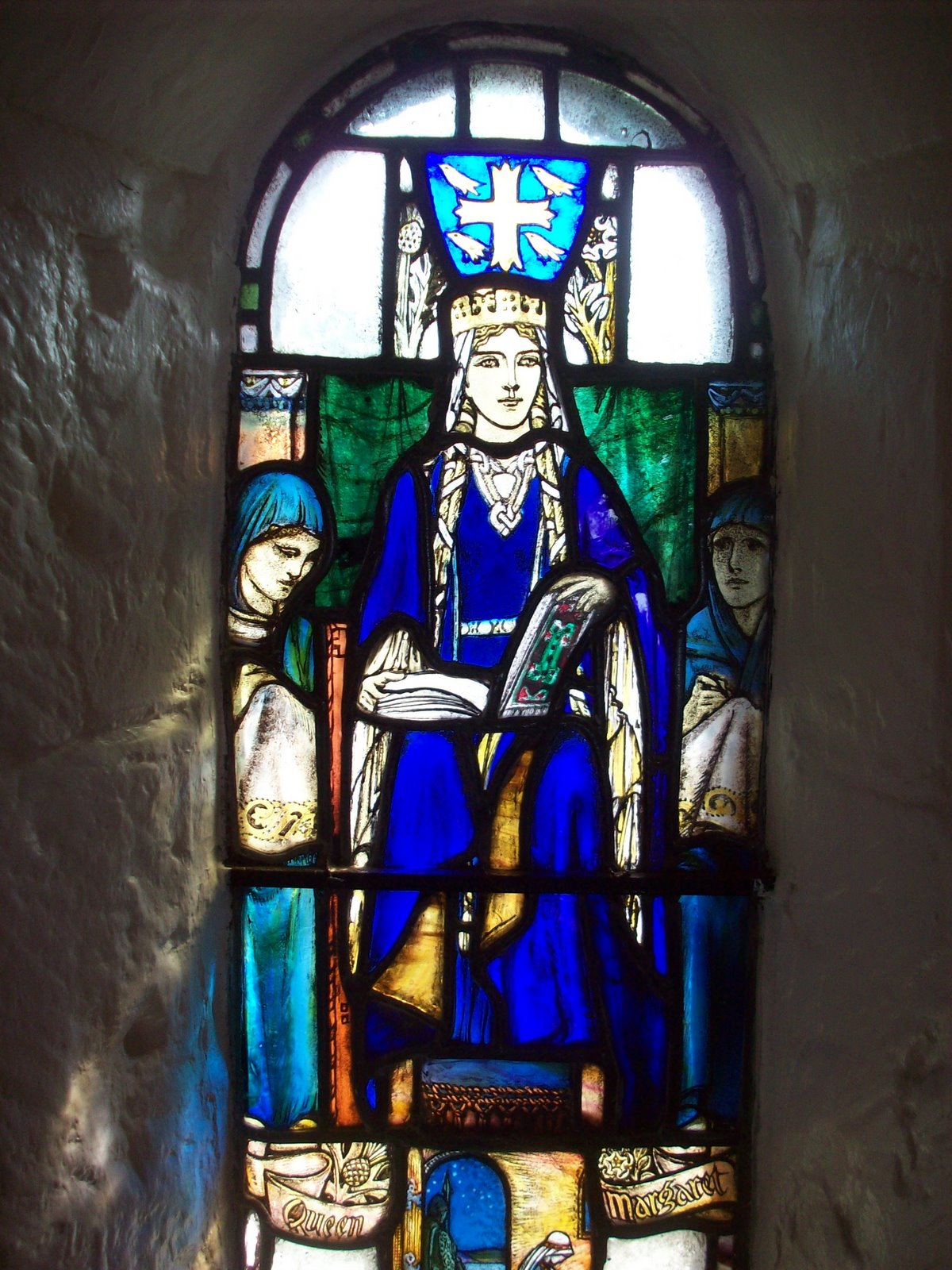 Bleiglasfenster von Margareta von Schottland auf Edinburgh Castle